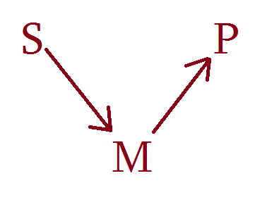 Դունկեր․ մտածողության առաջադրանքի սխեման